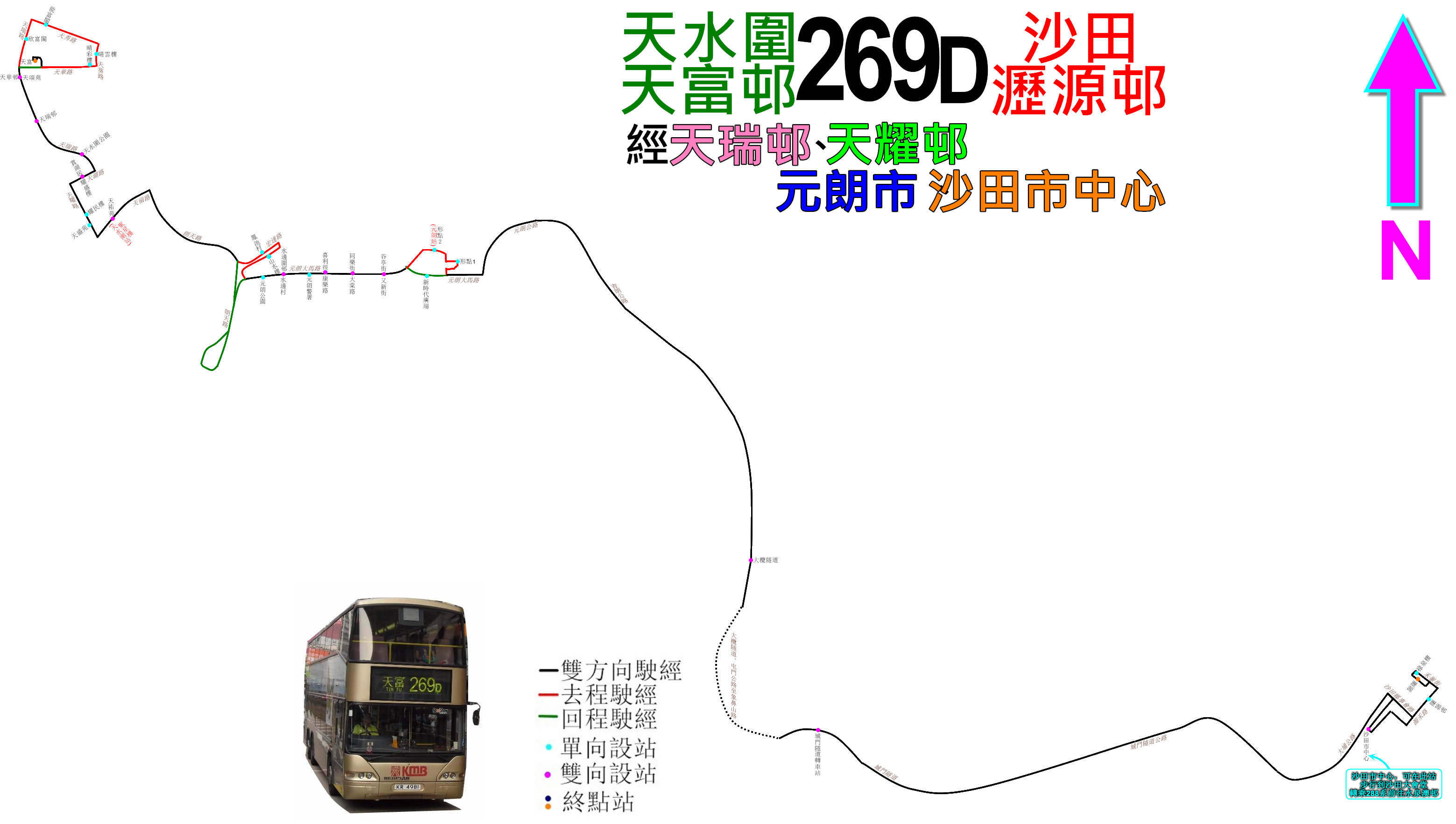 中文（香港）: 九巴269D線的走線圖